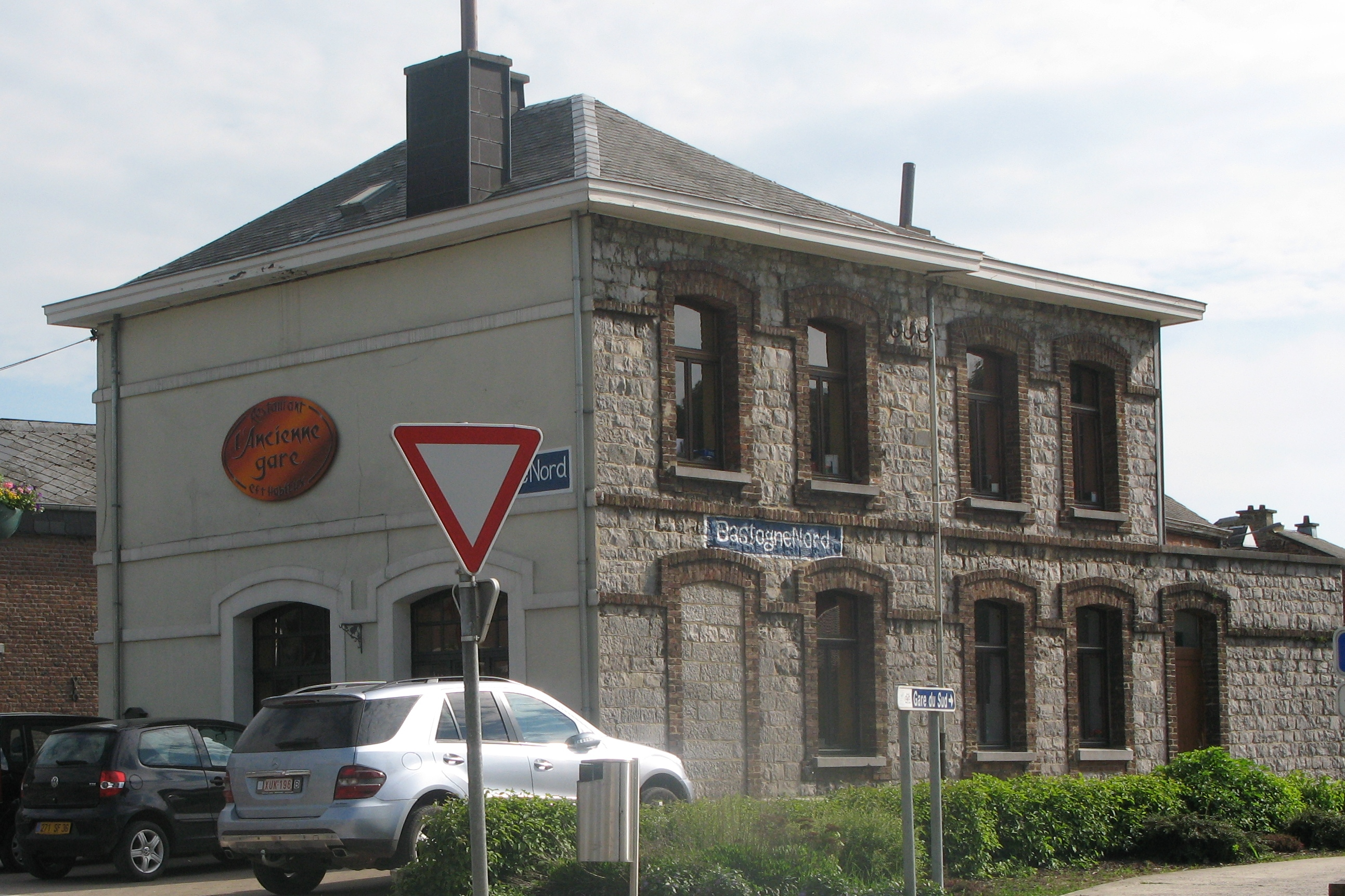 Eisebunnsstreck Libramont - St. Vith, D'Gare Baaschtnech Nord am Mee 2008 Quell: eege Foto Les Meloures